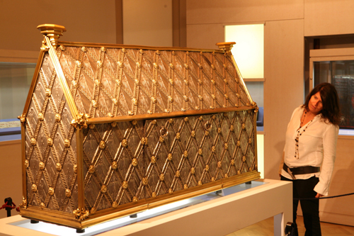 Eine Besucherin betrachtet den Nürnberger Heiltumsschrein in der Ausstellung Heiliges Römisches Reich Deutscher Nation